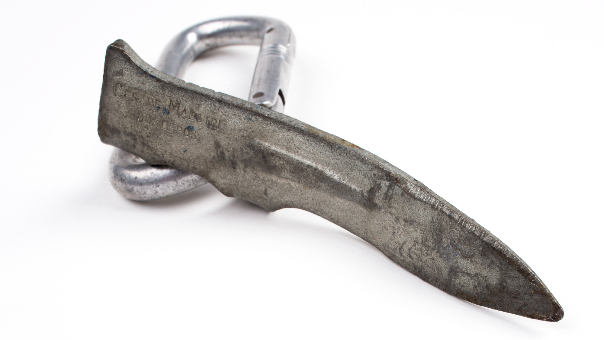 Spedizione Cetto Torre. Cresta sud est (via del compressore)